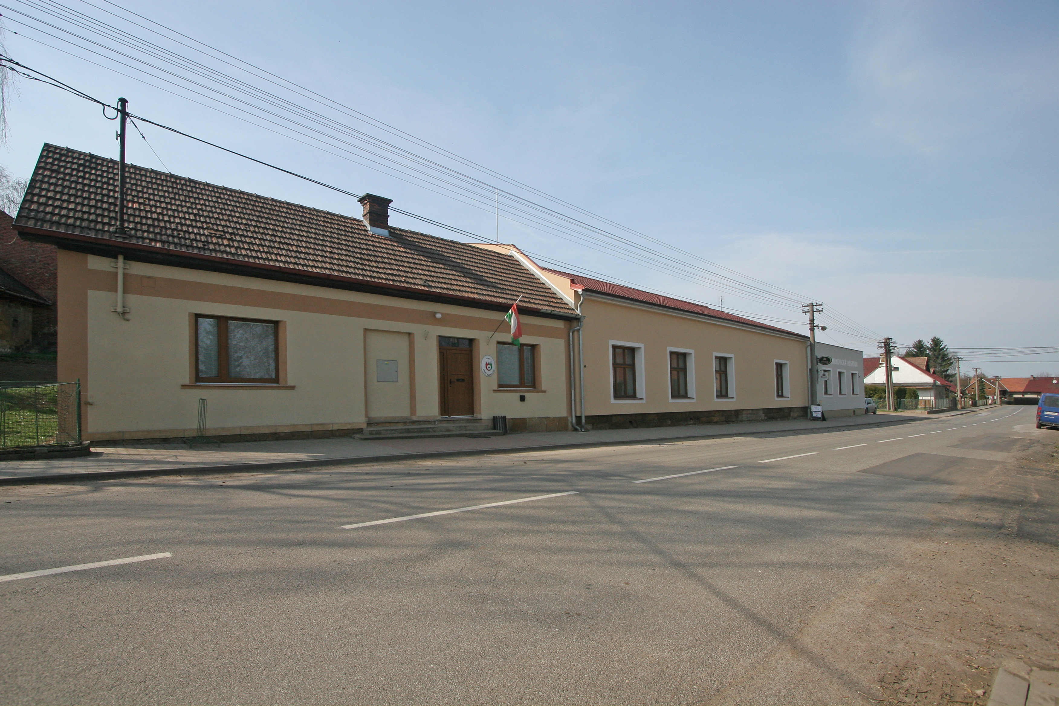 Staré Smrkovice obecní úřad